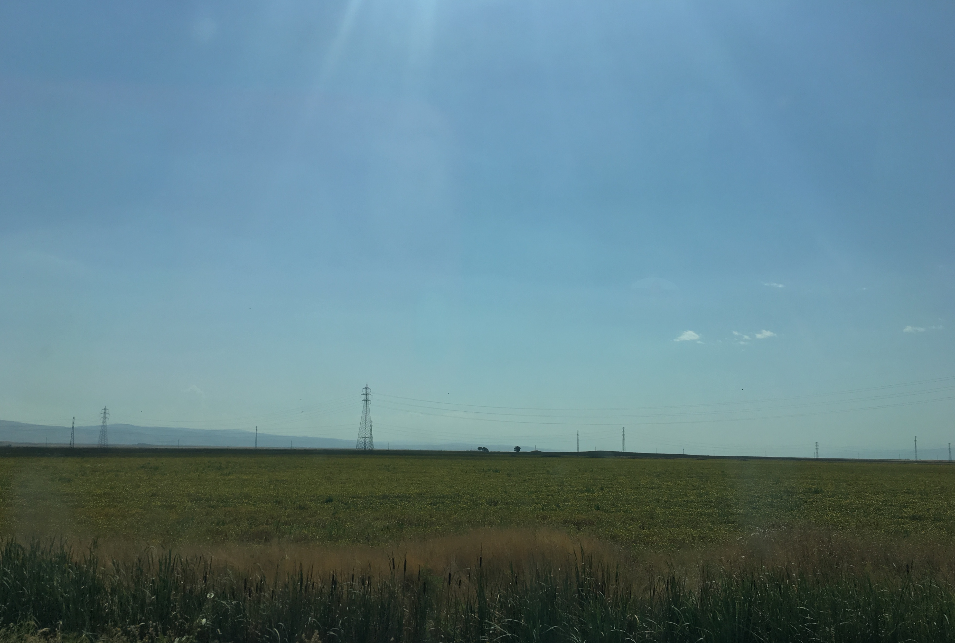 Մշո դաշտ